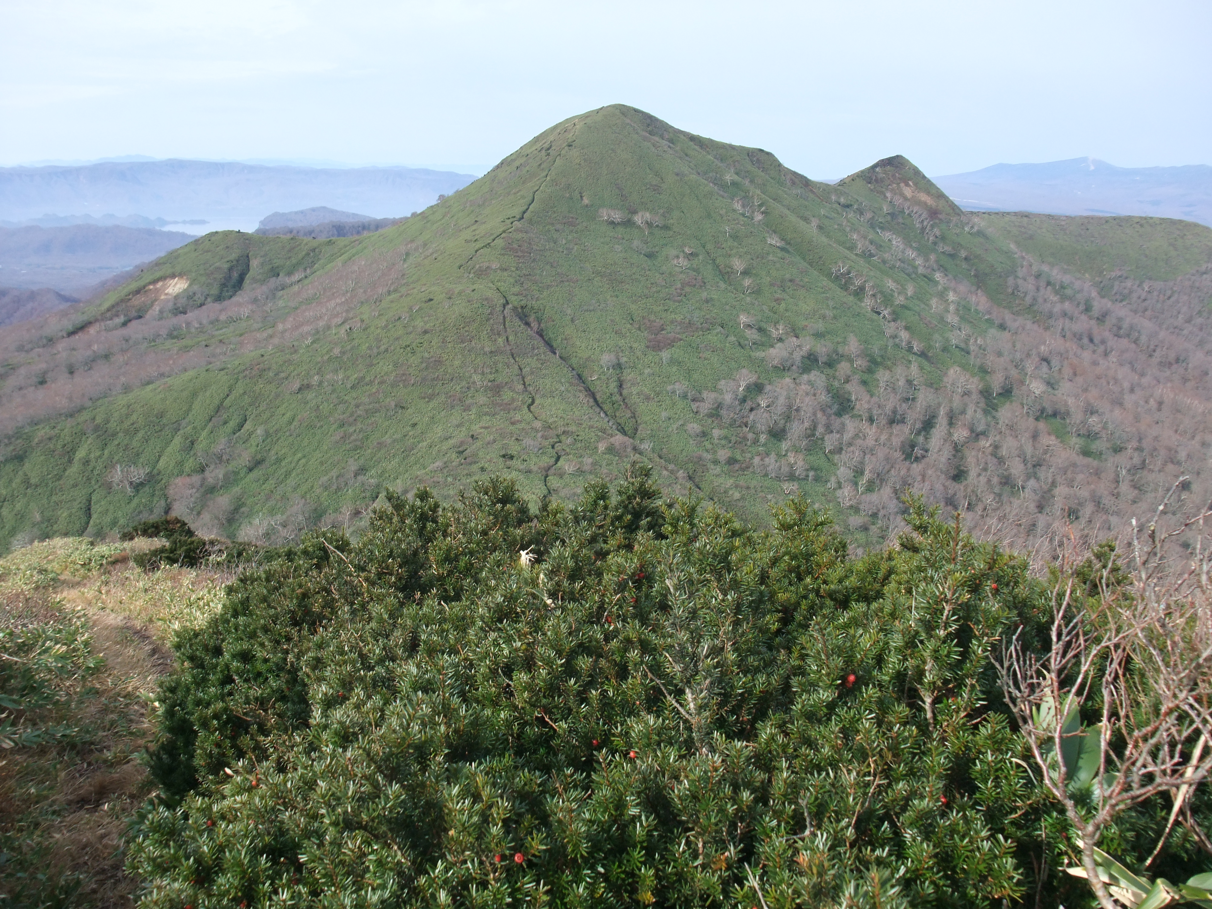 大駒ヶ岳から見た三ツ岳 手前に、大駒ヶ岳特有のイチイの矮生林が見える